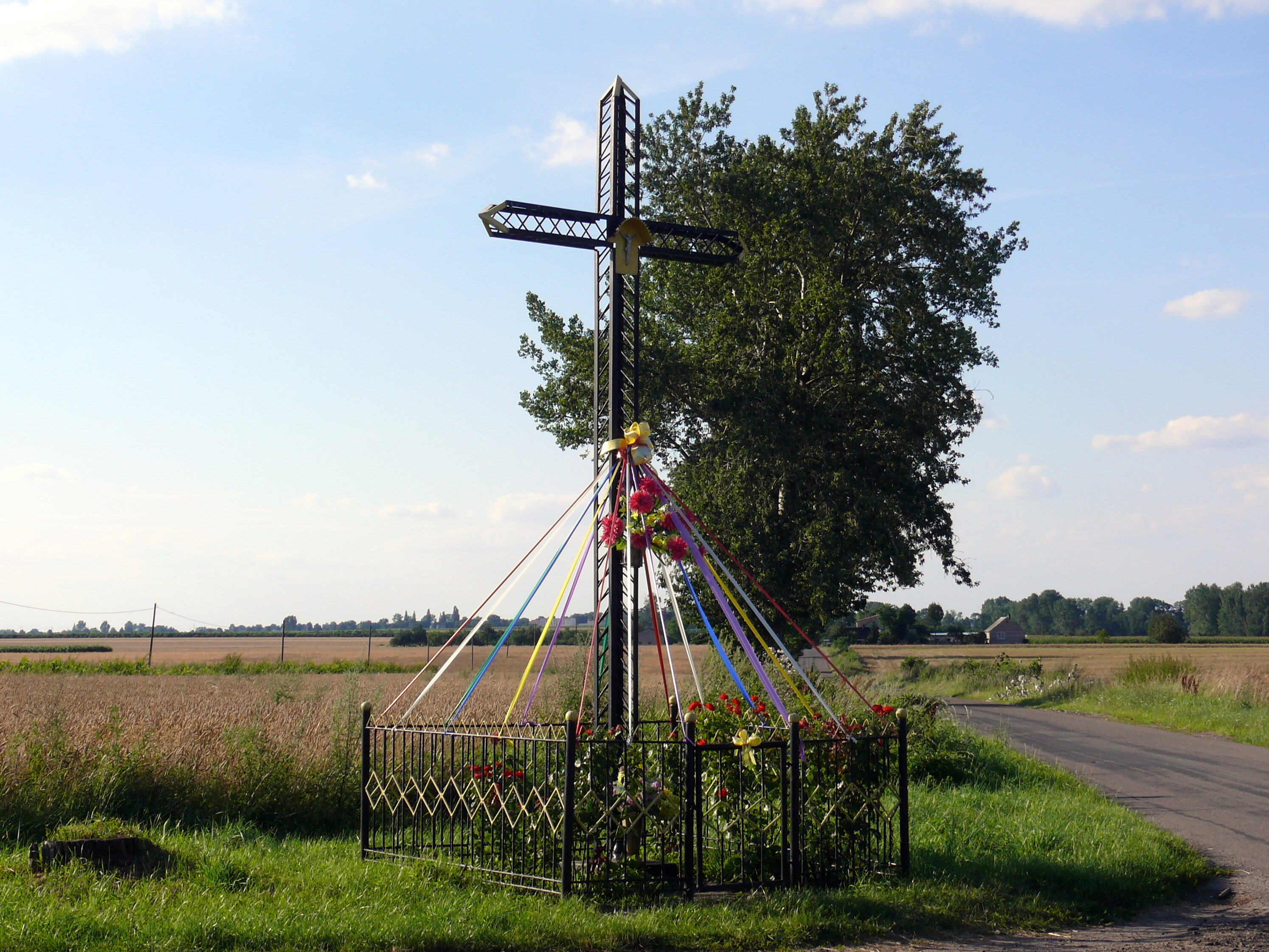 Przydrożny krzyż w Leszczach.